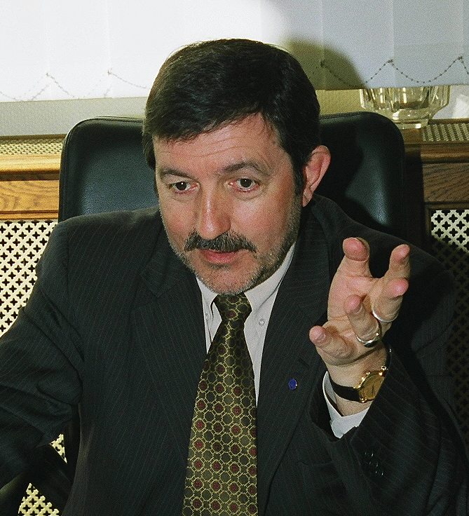 Cliché libre de droit, diffusable moyennant mention du crédit Ville de Nevers